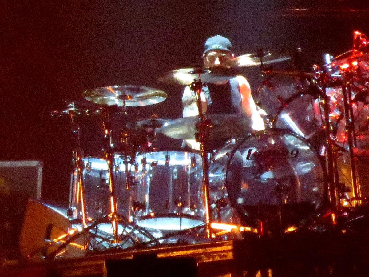 Dave Lombardo tocando com o Slayer em show de 2012